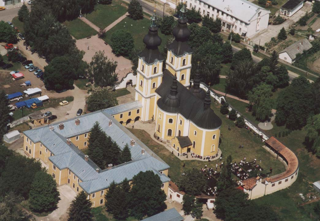 Szent Mihály főangyal Görög Katolikus templom, Máriapócs